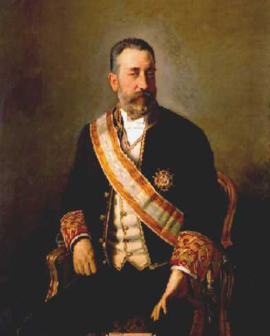 Retrato del politico español Joaquín López Puigcerver (1841-1906), que fue ministro de Hacienda, Fomento, Gracia y Justicia y Gobernación durante la regencia de María Cristina de Habsburgo-Lorena y nuevamente ministro de Gracia y Justicia durante el reinado de Alfonso XIII.